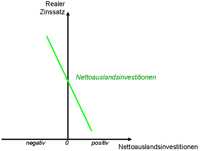 selbst erstellt, GNUFDL